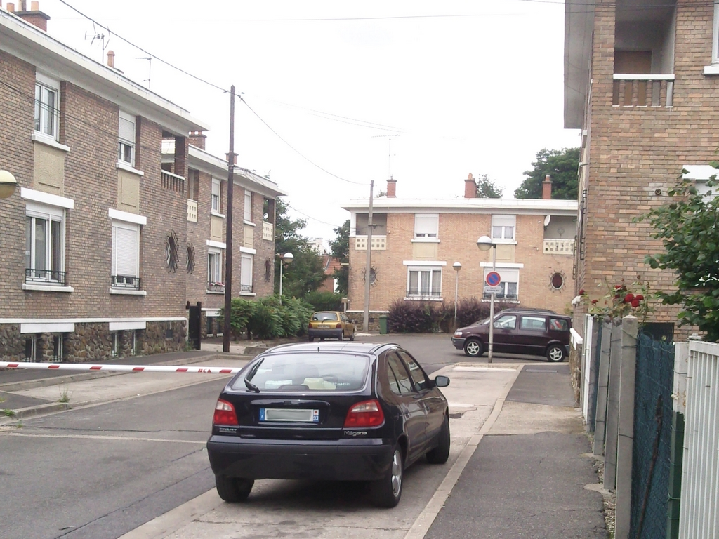 Bâtiments "collectifs" de la Cité-jardin de Drancy